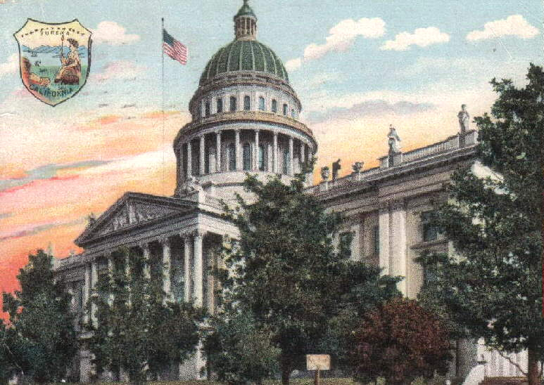 Capitol in Sacramento (Kalifornien)